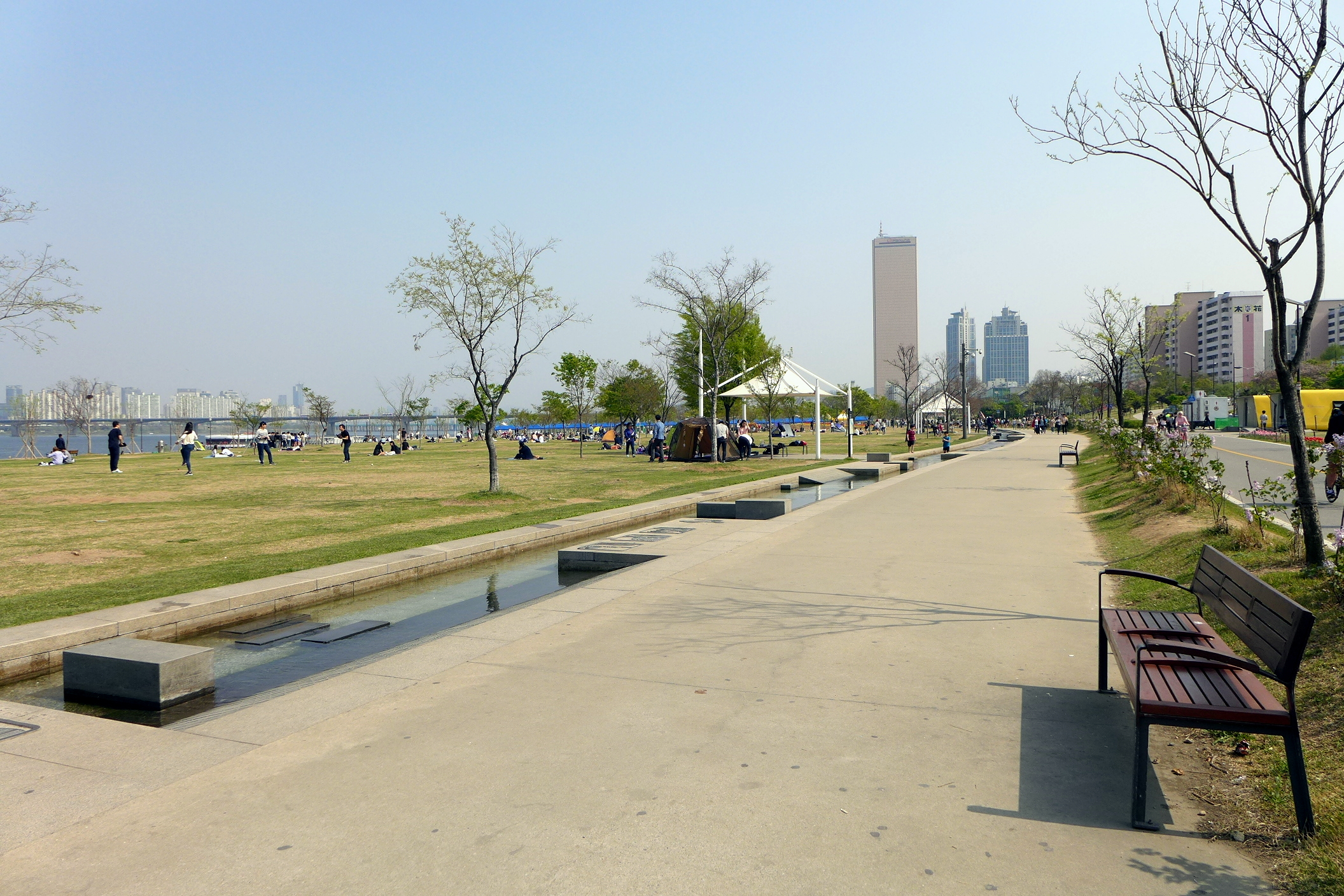 Hangang Park